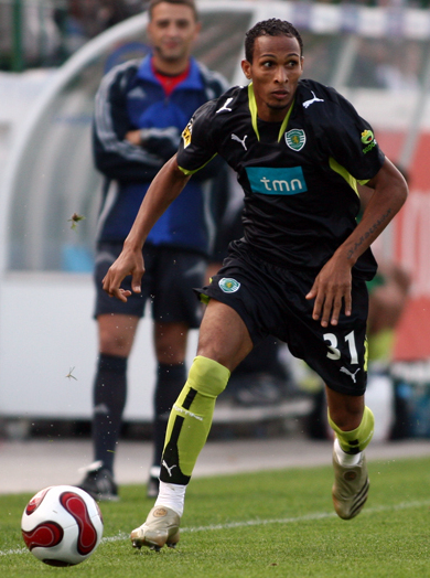 Liédson, 16. September 2007, Estrela da Amadora vs. Sporting Lisbon